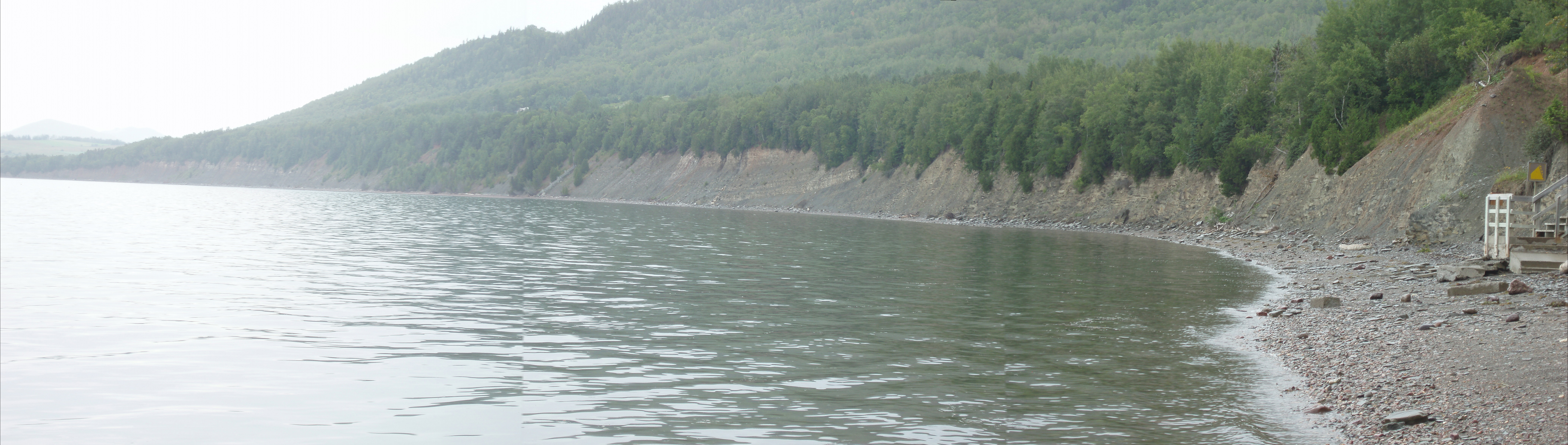 Falaise du Parc national de Miguasha (Québec), dans laquelle affleurent les couches dévoniennes riches en fossils de poisson. Cliff of the Miguasha National Park (Québec), with the Devonian beds that are rich in fish fossils.